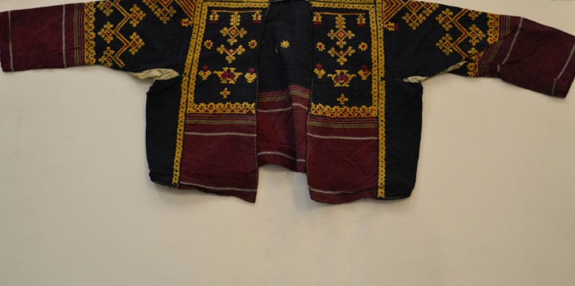 ಕನ್ನಡ: ರವಿಕೆ - ವ&ಅ ಮುಸೆಉಮ್ ಧರ್ವರ್, ಇಂಡಿಯಾ - ಷ. ೧೮೫೫ -೧೮೭೯